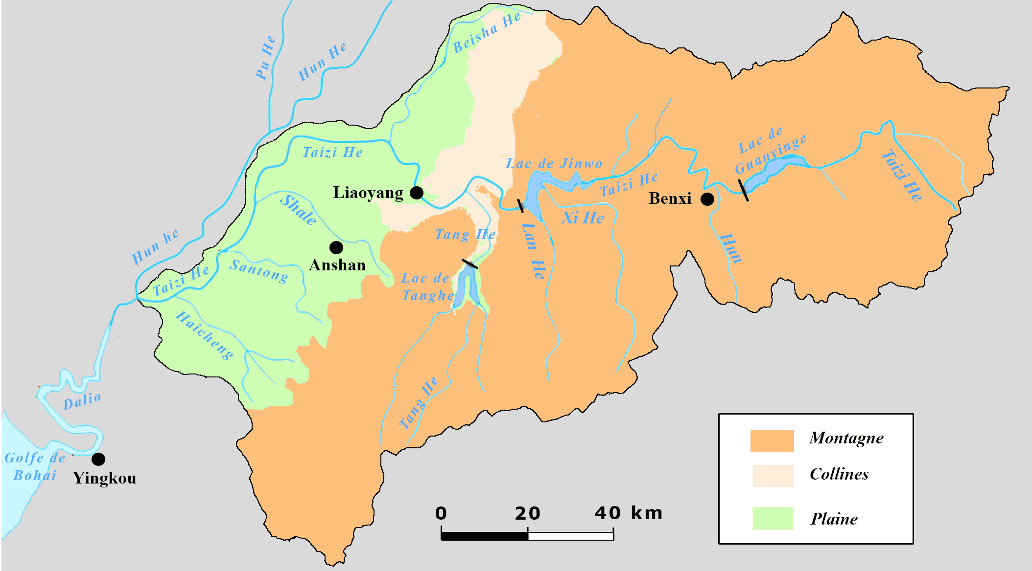 Bassin versant du Taizi, rivière qui coule dans la province de Liaoning au nord est de la Chine.